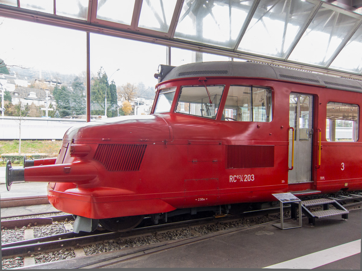 Roter Pfeil mit Original-Betriebsnummer 203 im Verkehrshaus Luzern